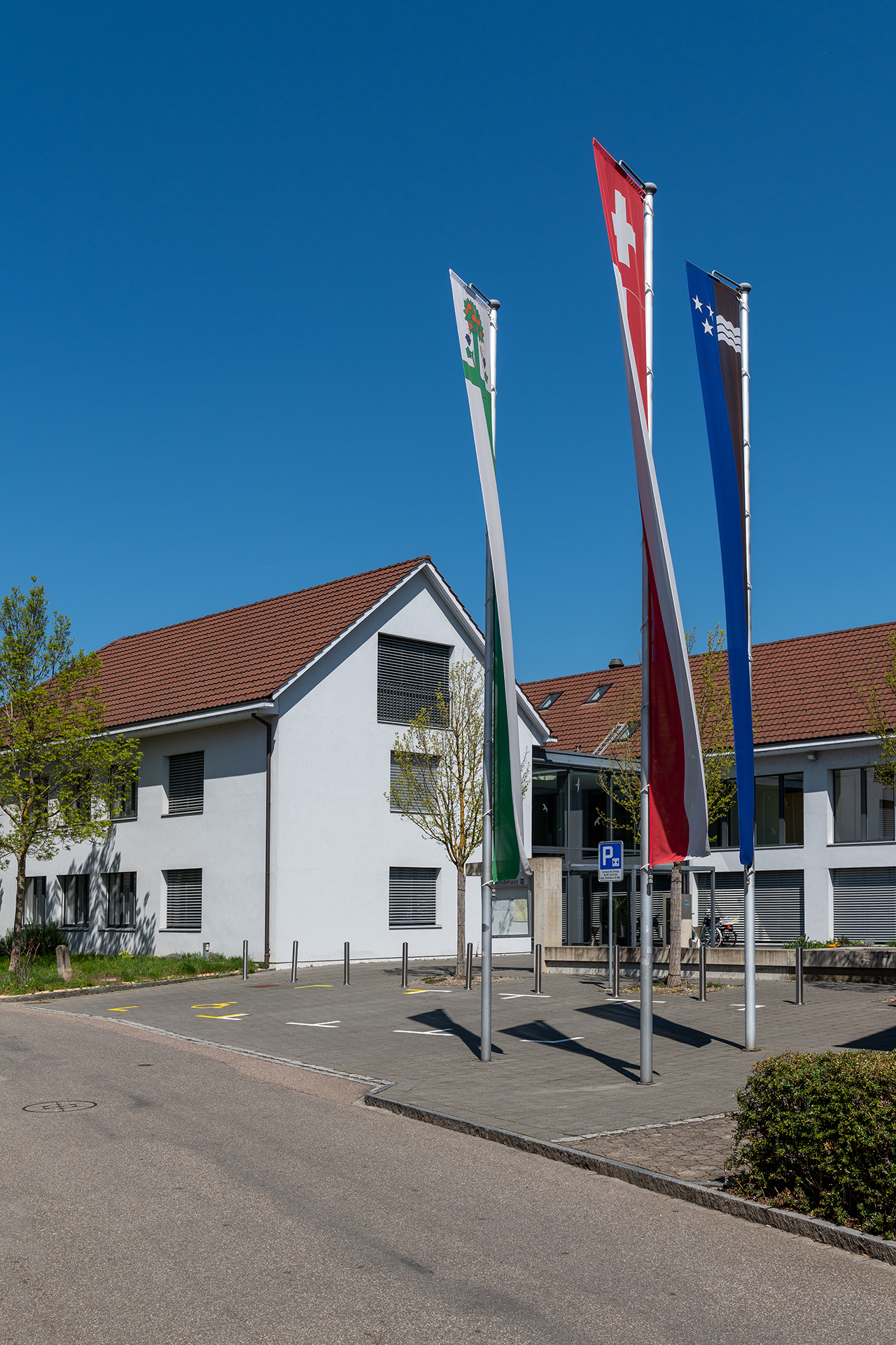 Gemeindehaus von Magden (AG) im Dorfzentrum